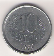 Frente da moeda de 10 centavos da primeira geração. Cunhada em 1994. This graphic was created with GIMP.